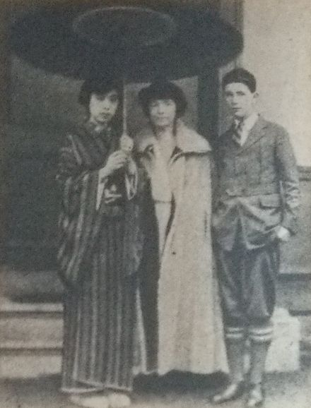 1922年の訪日時のマーガレット・サンガー。右はマーガレットの息子で、左は石本シヅエ。